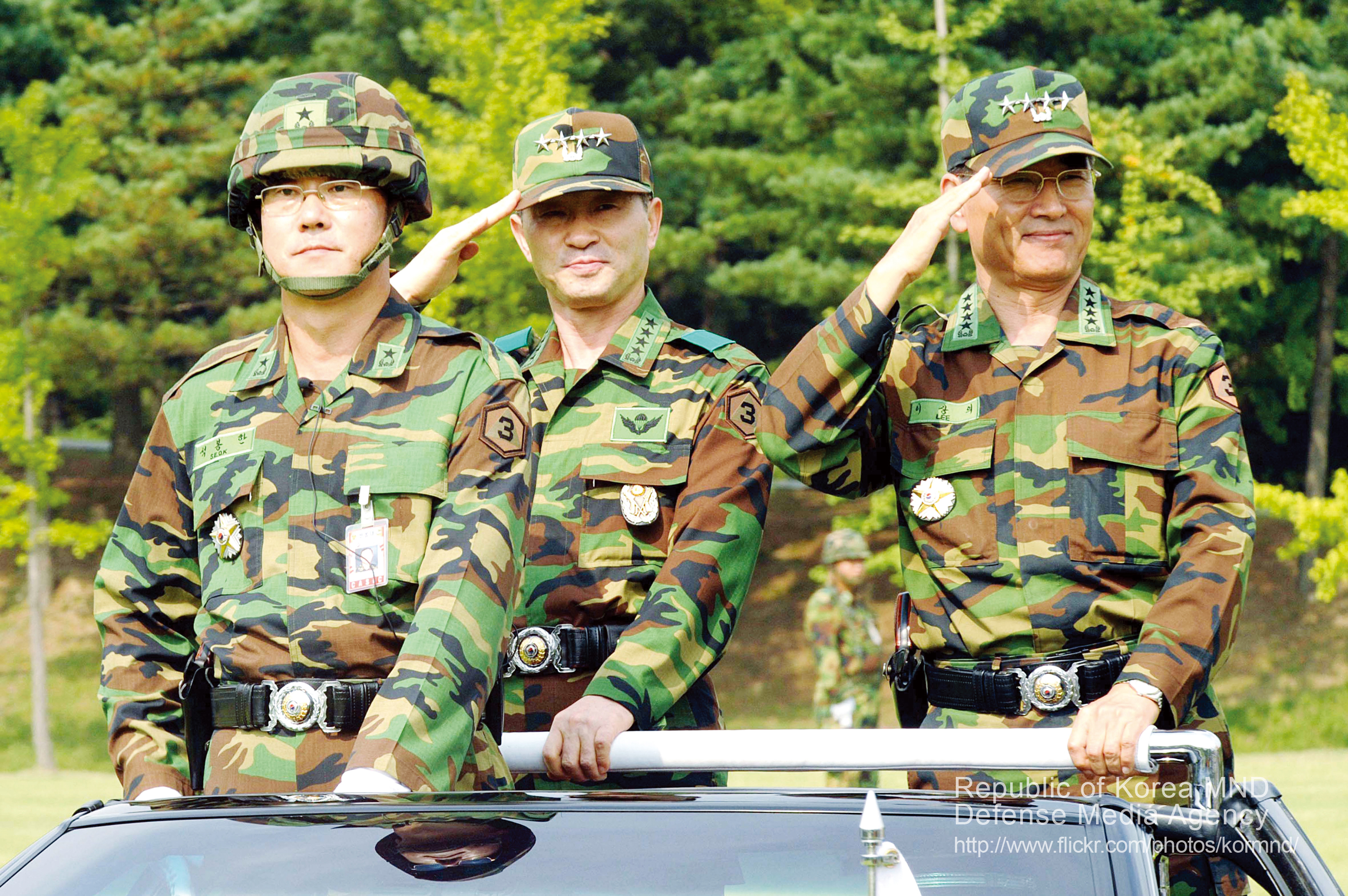 2009 국방화보 Rep. of Korea, Defense Photo Magazine 제23대 제3야전군사령관 김상기(가운데) 대장 취임 식이 9월 17일 오후 2시 임충빈 육군참모총장 주관 으로 역대 군사령관과 지역 기관장·내빈 등이 참석 한 가운데 경기도 용인 3군사령부 연병장에서 거행 됐다.